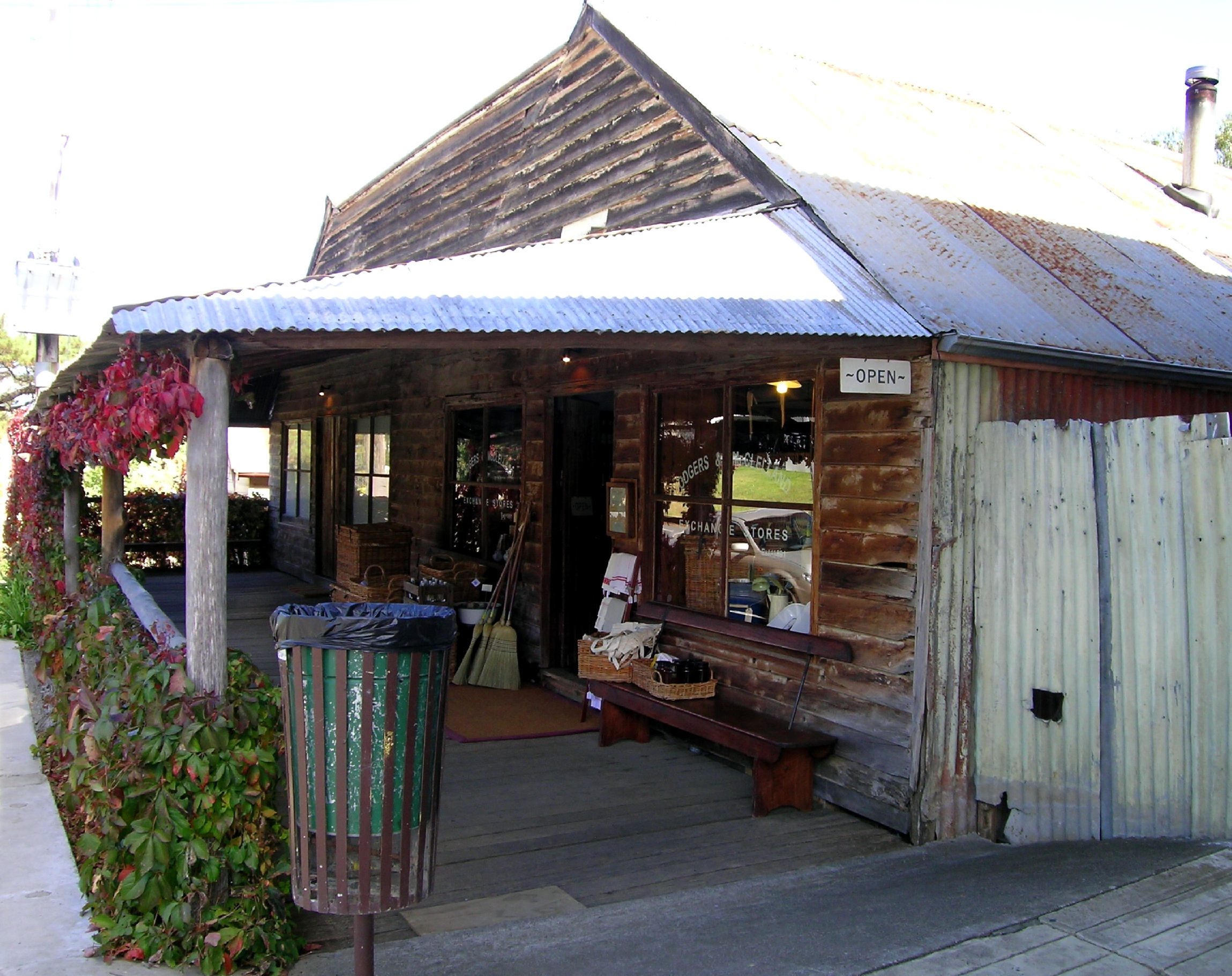 Odgers and McClelland Exchange Stores, Jenkins St, Nundle, NSW